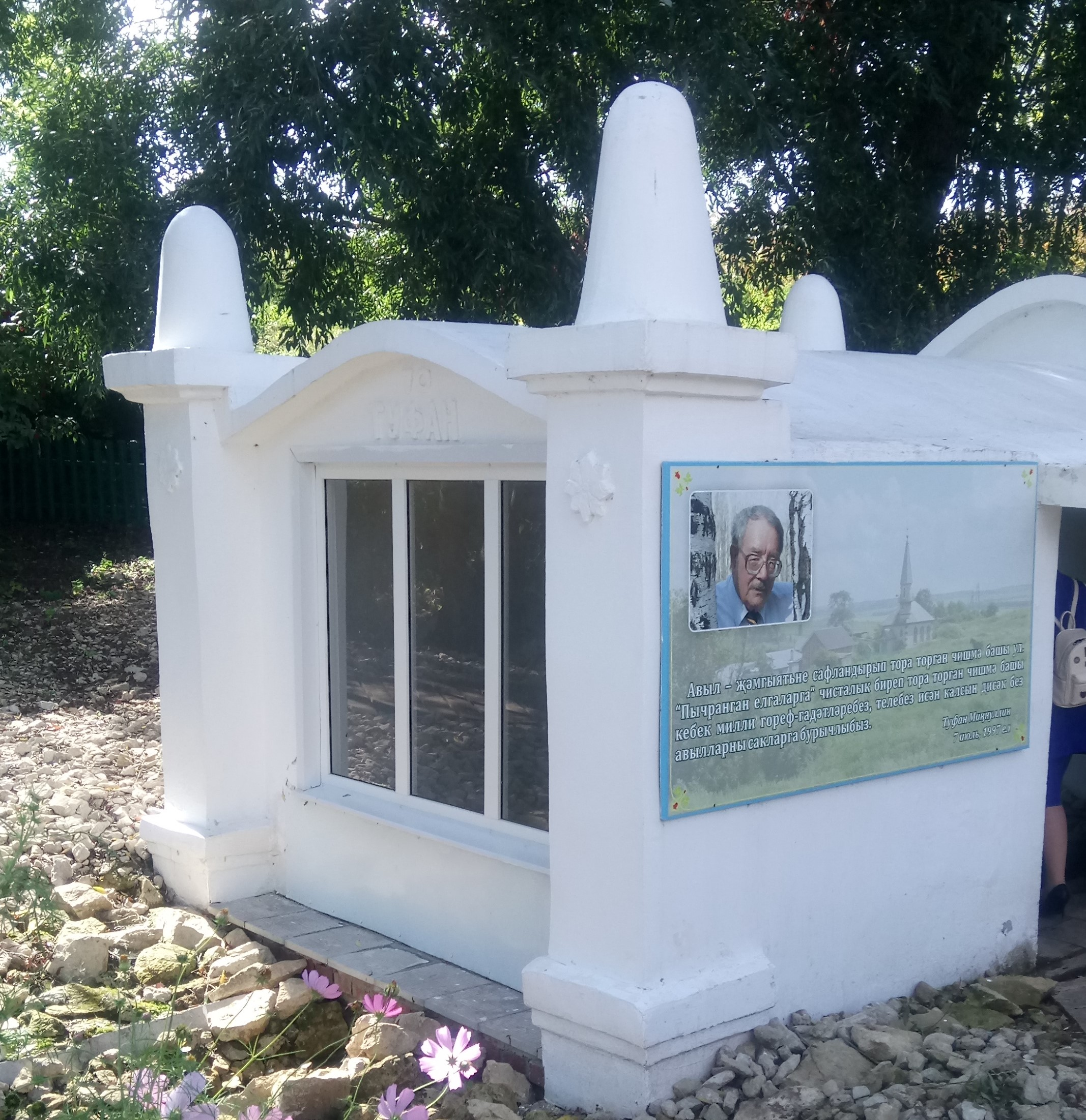 Татарча/tatarça: Туфан чишмәсе